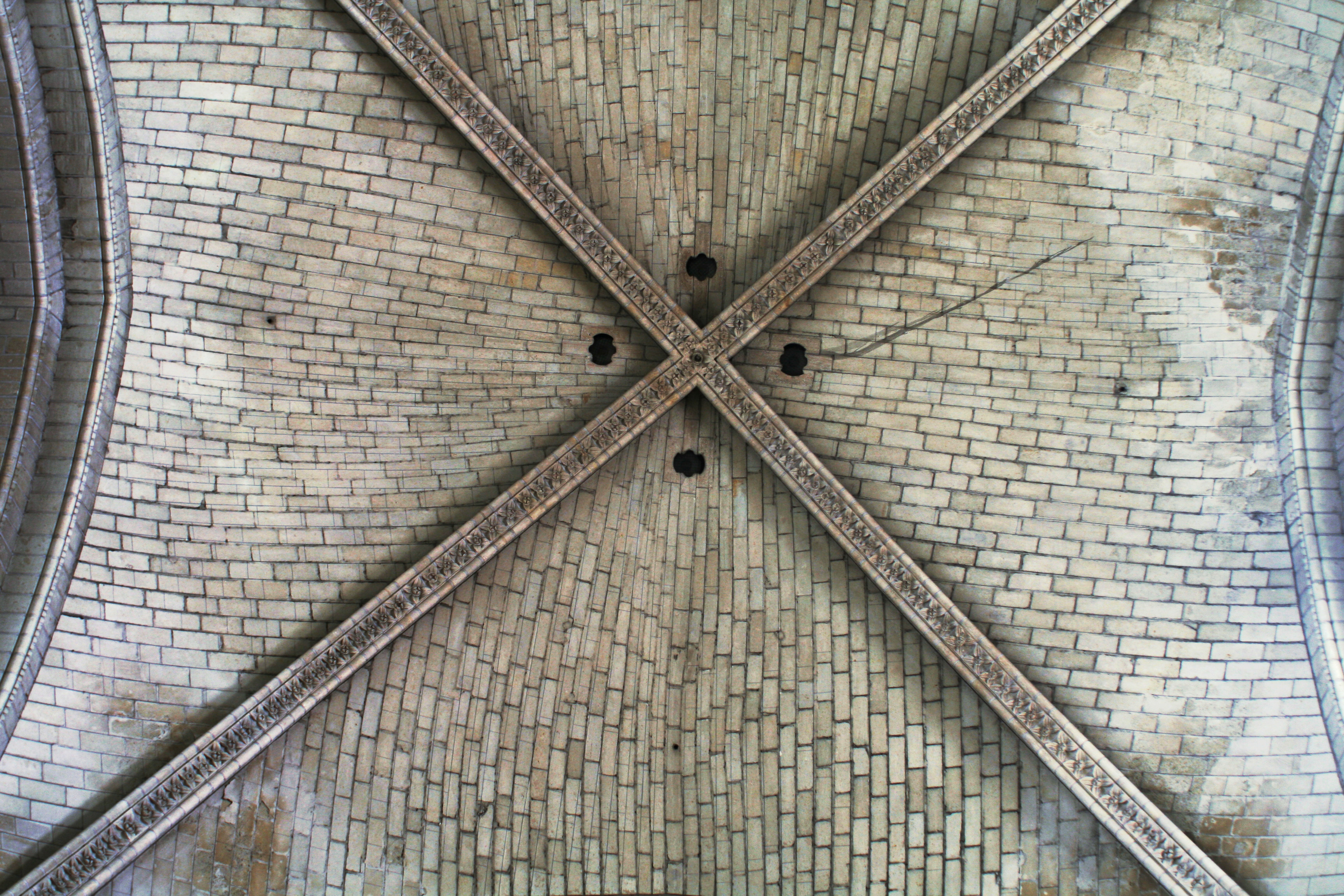 Voûte d'une travée de la nef de la cathédrale d'Angers (voûte angevine ou voûte Plantagenêt). On voit assez bien les joints peints sur les voûtes, plus régulier que l'appareillage.